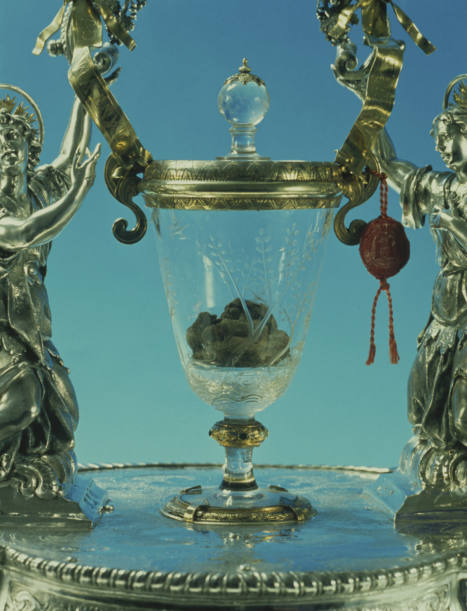 particolare dell'ampolla dove è contenuto il sangue del Miracolo Eucaristico (Lanciano, Italia)